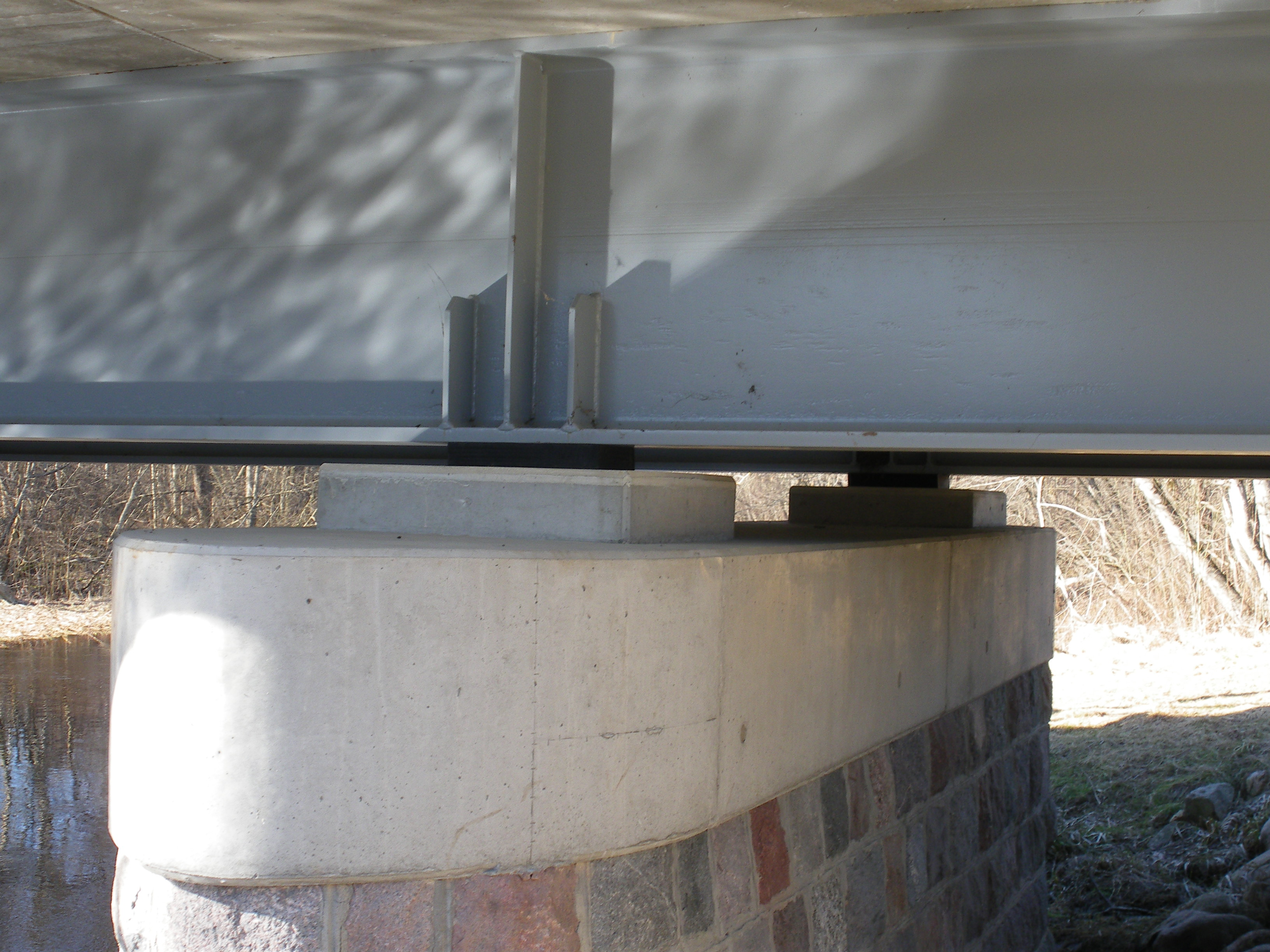 Soodla silla peakanduri toetus jõesambale.